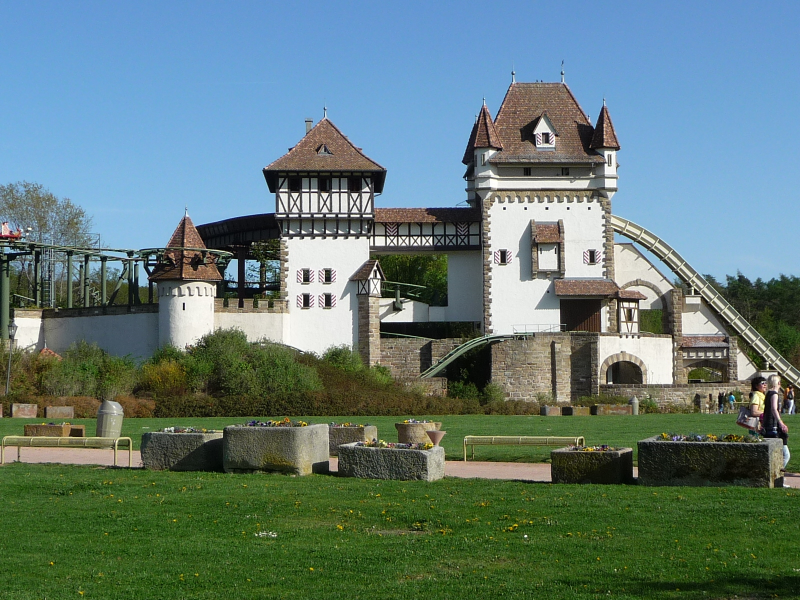 Erlebnispark Tripsdrill